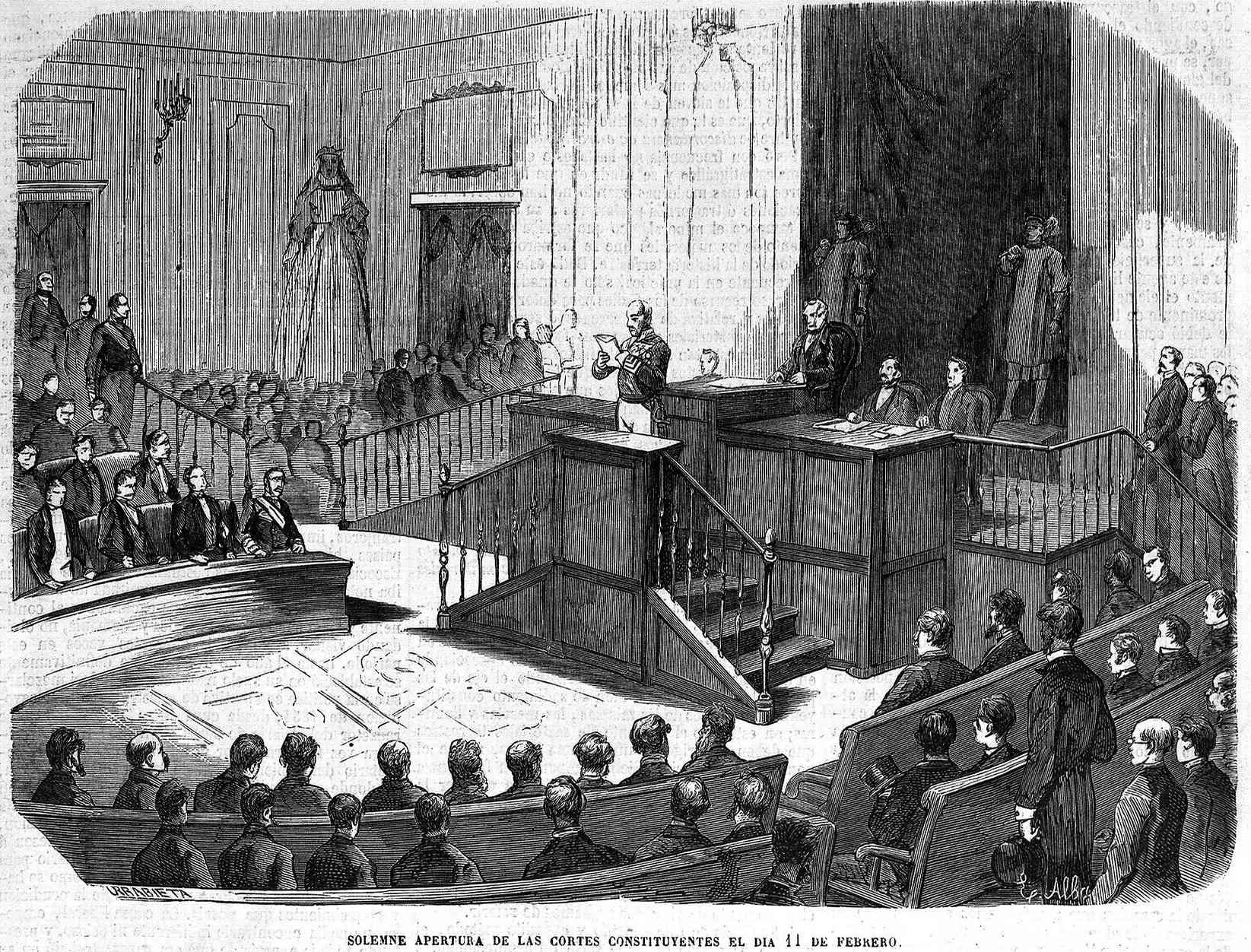 Solemne apertura de las cortes constituyentes el día 11 de febrero de 1869, en la revista española El Museo Universal.